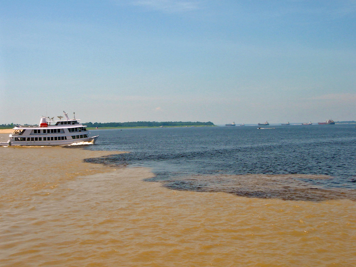 Rio Amazonas: Encontro das águas rio Solimões e rio Negro